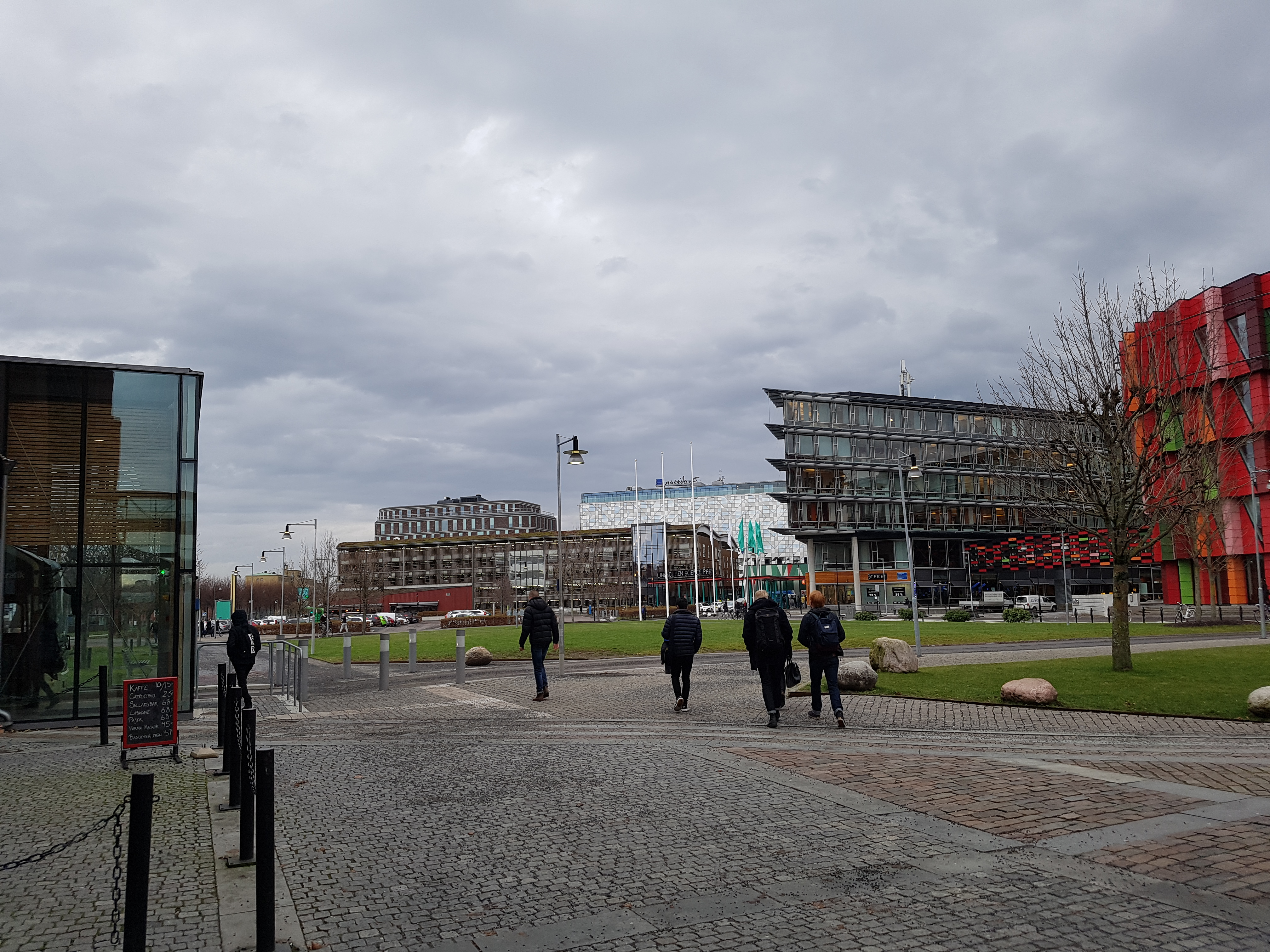 Chalmers Lindholmen Campus